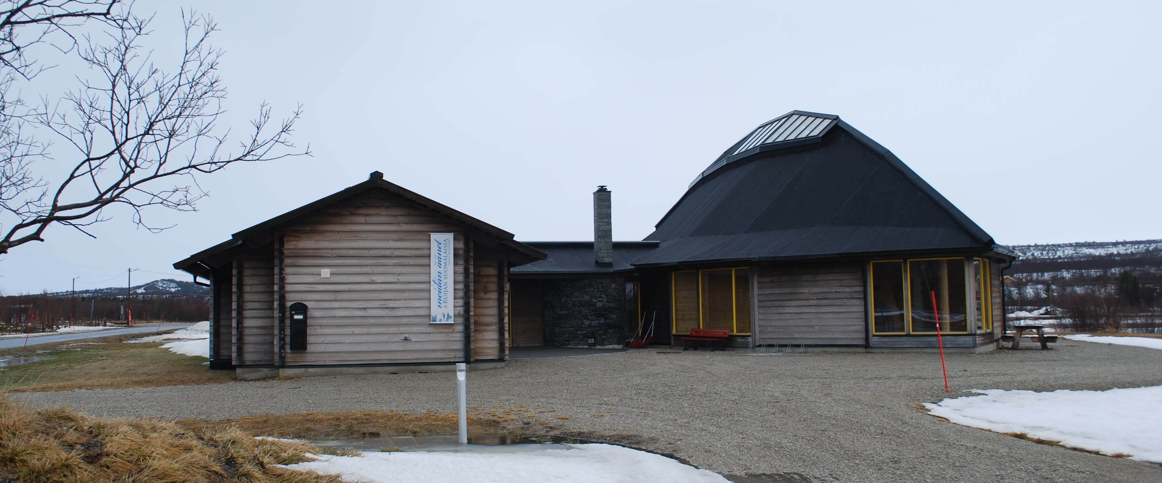 Kvensk Institutt på Kventunet, Børselv, Porsanger kommune, Finnmark